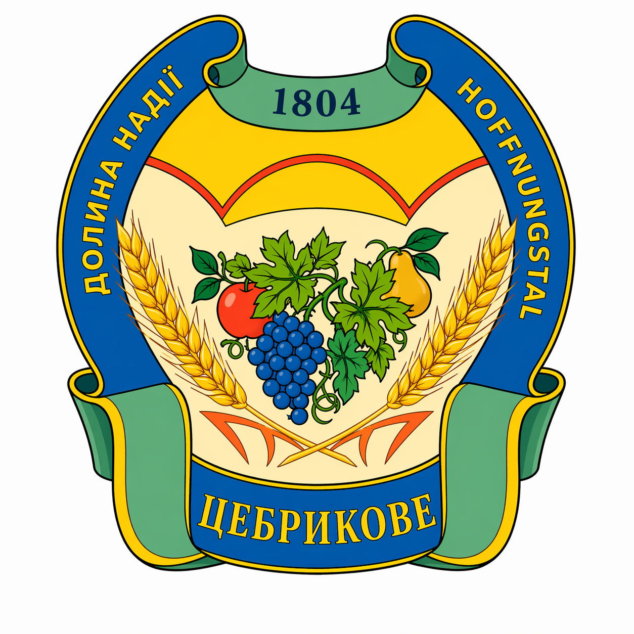 Герб Цебрикового